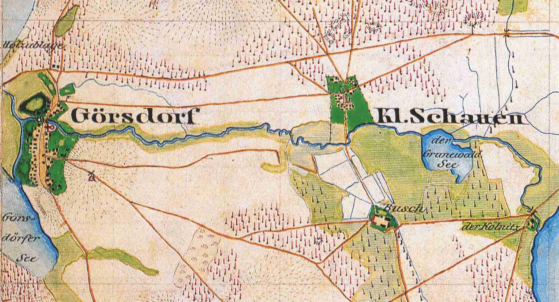 Görsdorf b. Storkow und Klein Schauen, Ortsteile der Stadt Storkow (Mark), Lkr. Oder-Spree, Brandenburg, Deutschland, Ausschnitt aus dem Urmesstischblatt 3749 Storkow von 1844